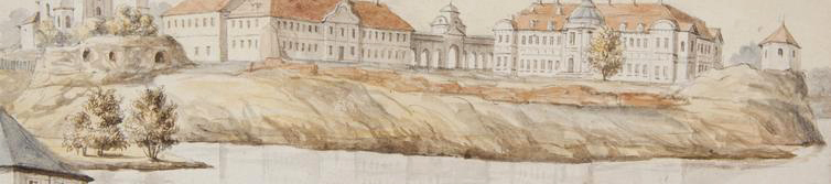 Замок у Новому Заславі (фрагмент малюнку).